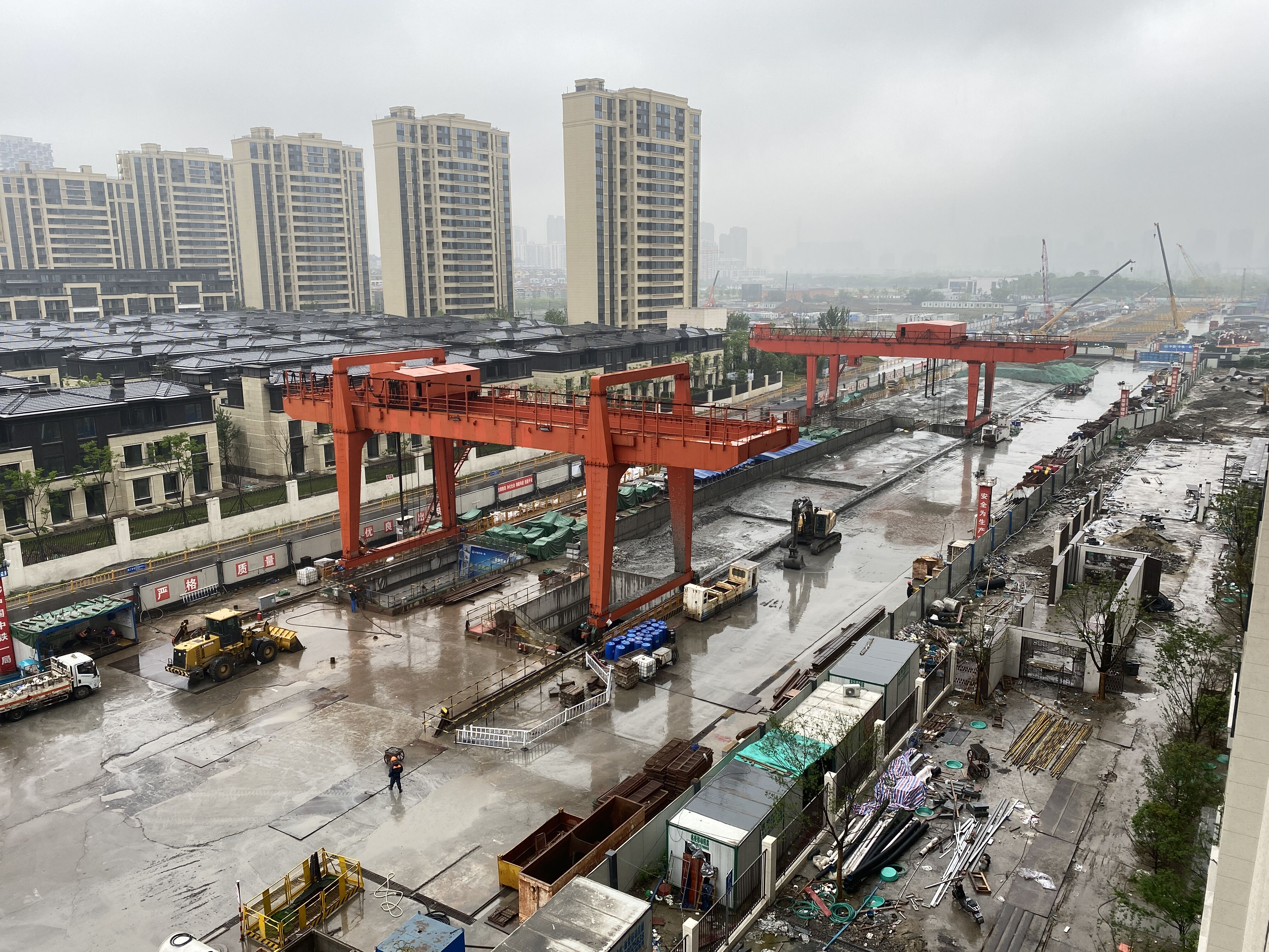 星桥路站工地